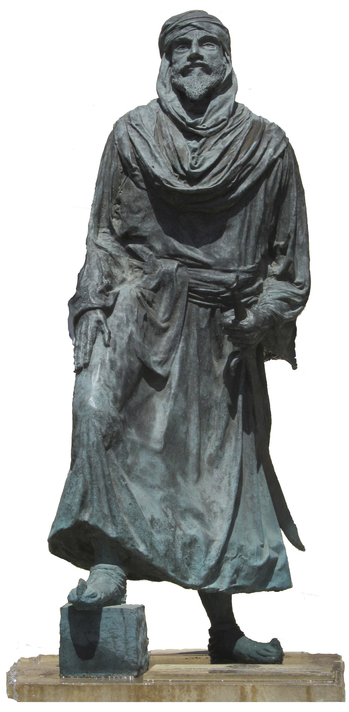 Almería - Escultura en bronce a los pies de la Alcazaba recuerda al primer rey de la Taifa de Almería, el Rey Jairán, que inició su mandato en el año 1014.